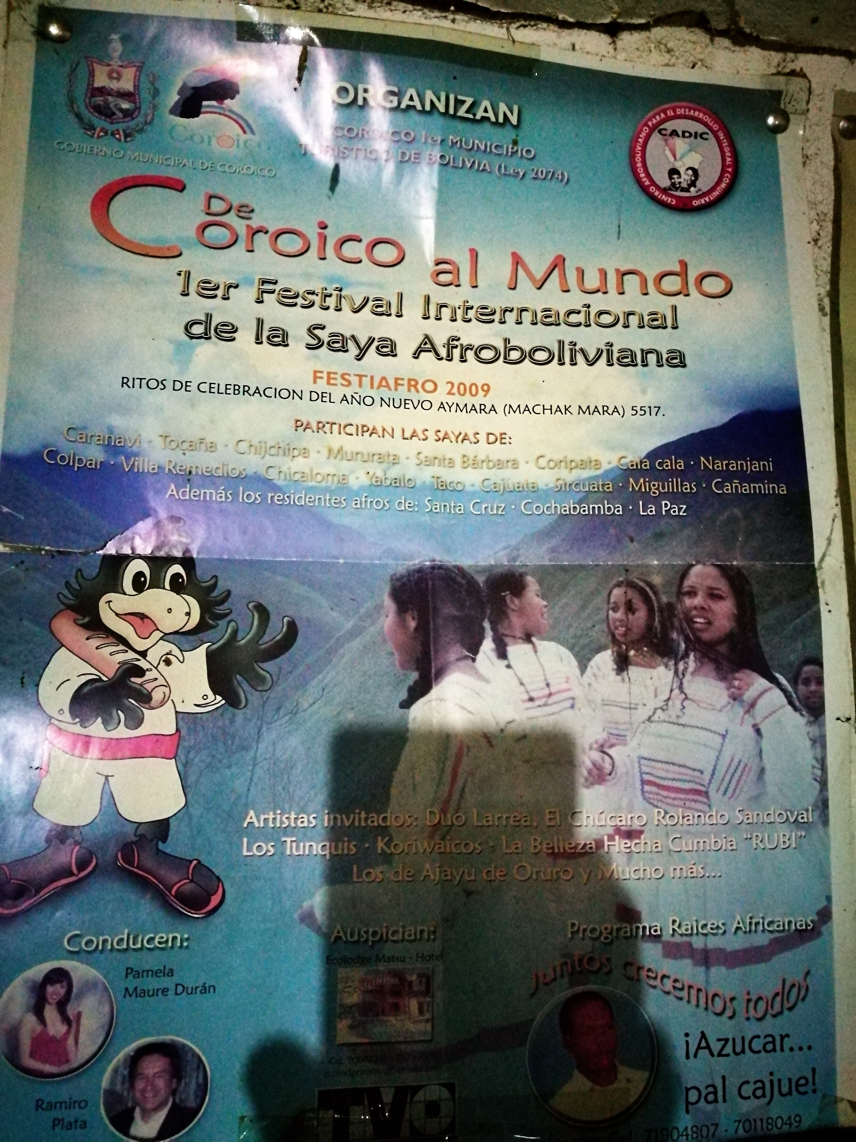 Programa del Primer Festival Internacional de la Saya boliviana